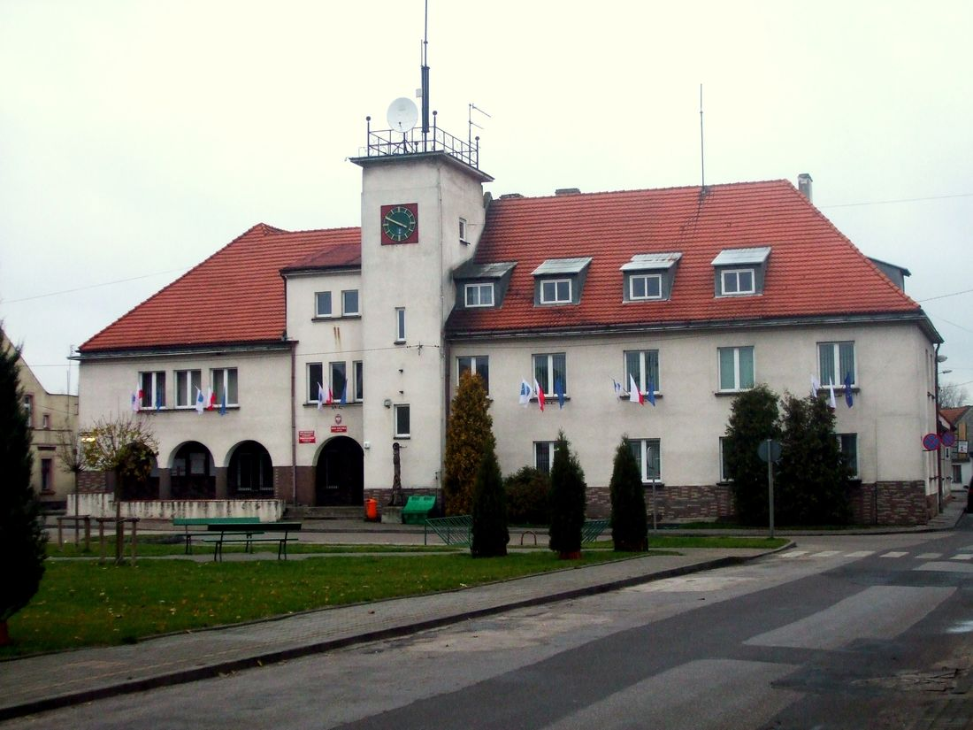 Ratusz Miejski w Łabiszynie